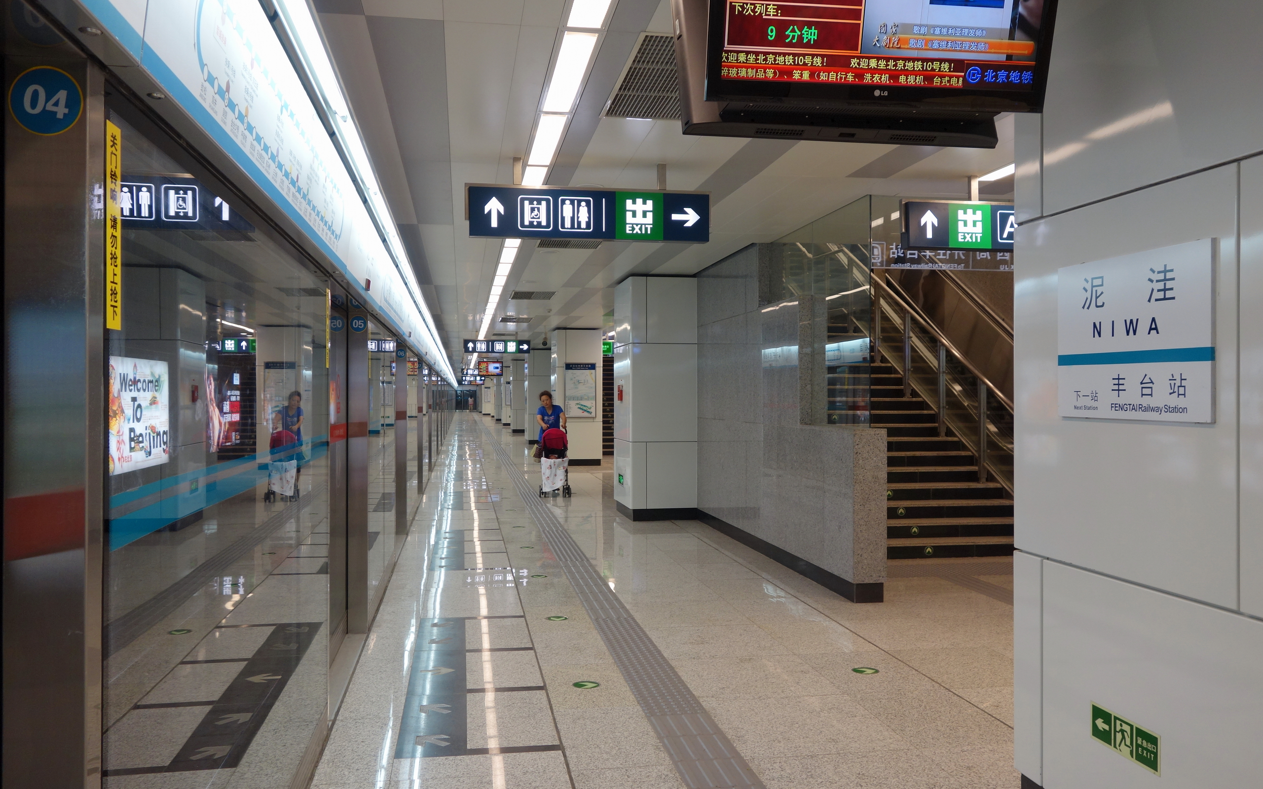 泥洼站的站台